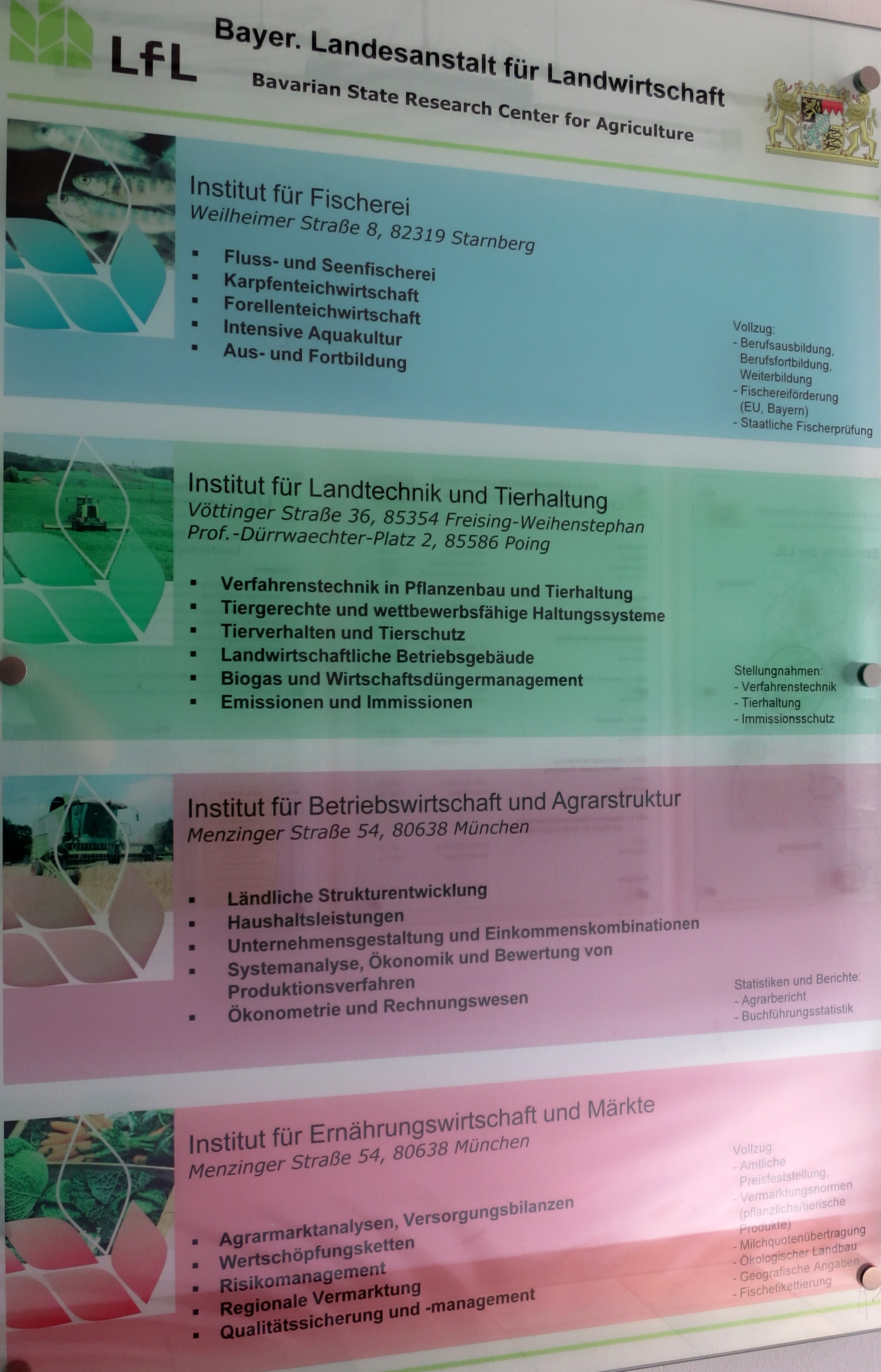 Infotafel im Verwaltungsgebäude 01